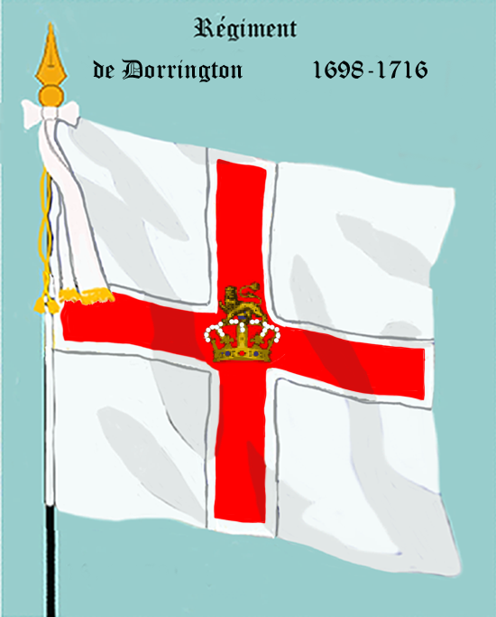 Ordonnanzfahne eines Fremdenregiments im königlich französischen Dienst. - Entnommen und überarbeitet aus: „LES UNIFORMES ET LES DRAPEAUX DE L'ARMÉE DU ROI“ Marseille 1899. (Drapeau d'Ordonnance d' un régiment etranger au service française.)